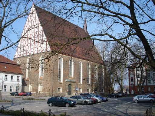 Konzerthalle "Carl Philipp Emanuel Bach", Frankfurt (Oder), Deutschland.